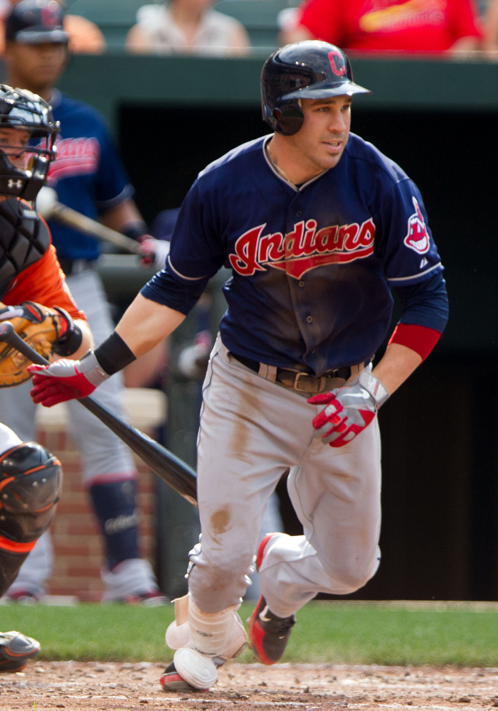 Jason Kipnis